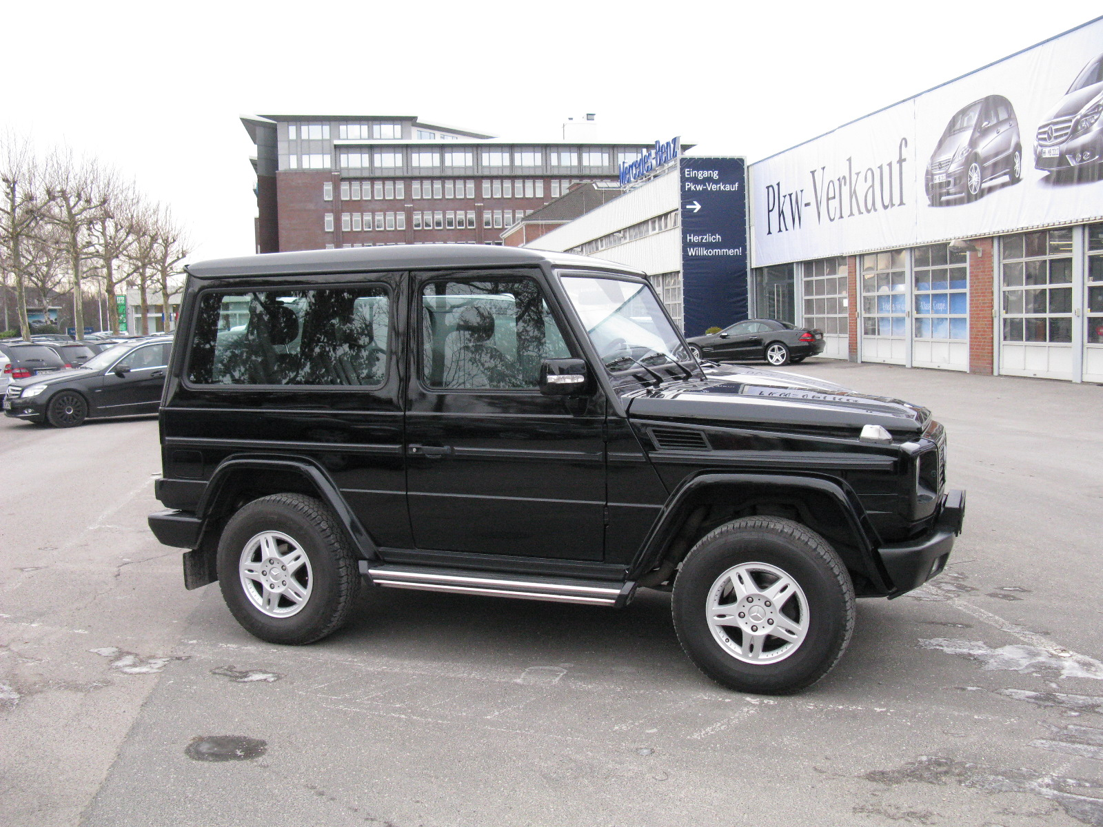 Mercedes-Benz Geländewagen